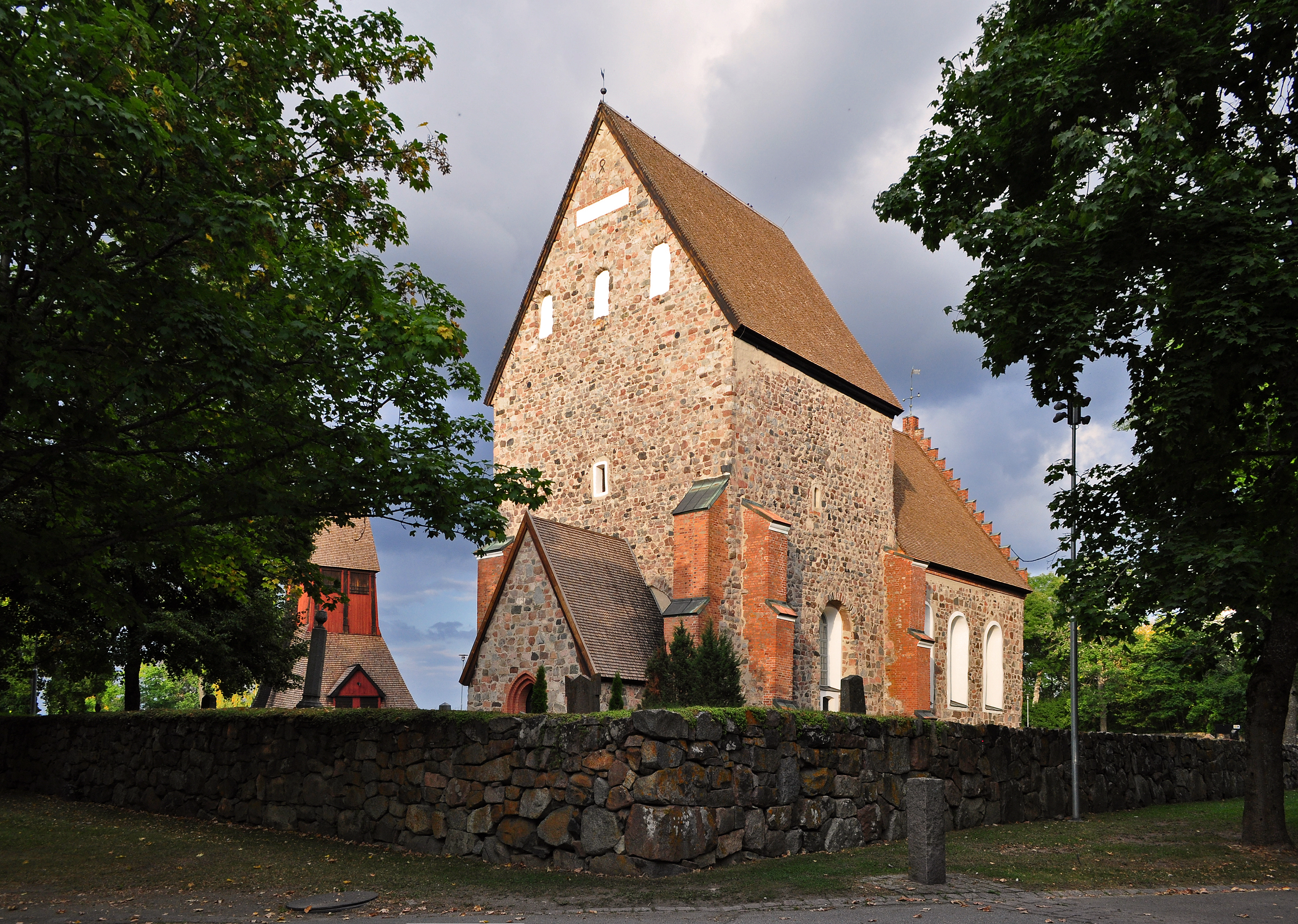 Gamla Uppsala kyrka (Gamla Uppsala 74:2)